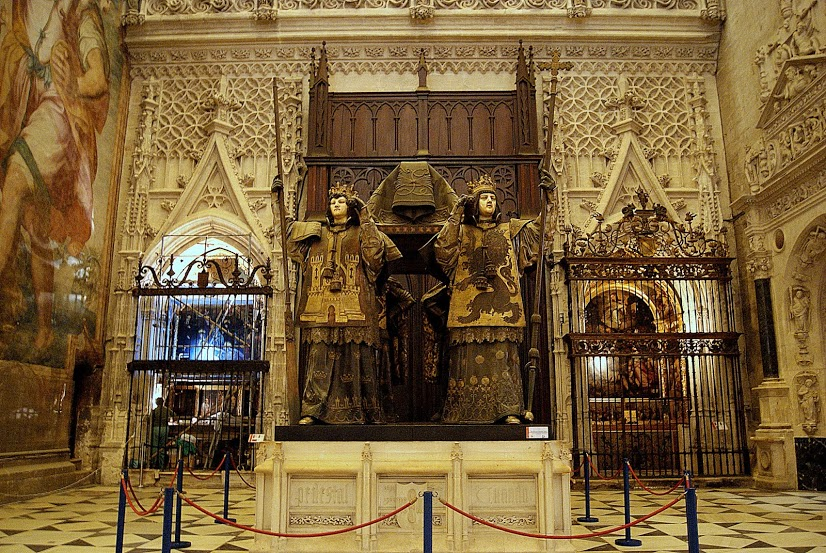 El sepulcro de Cristóbal Colón, en el brazo sur del crucero de la catedral de Sevilla, (España). A la izquierda del sepulcro puede verse el gran fresco de San Cristóbal y el altar de la Piedad, y a la derecha del mismo el altar de la Concepción.